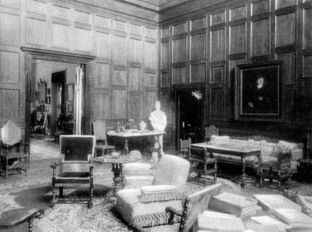 Zentrale, zweigeschossige Treppenhalle, Schloss Wiligrad